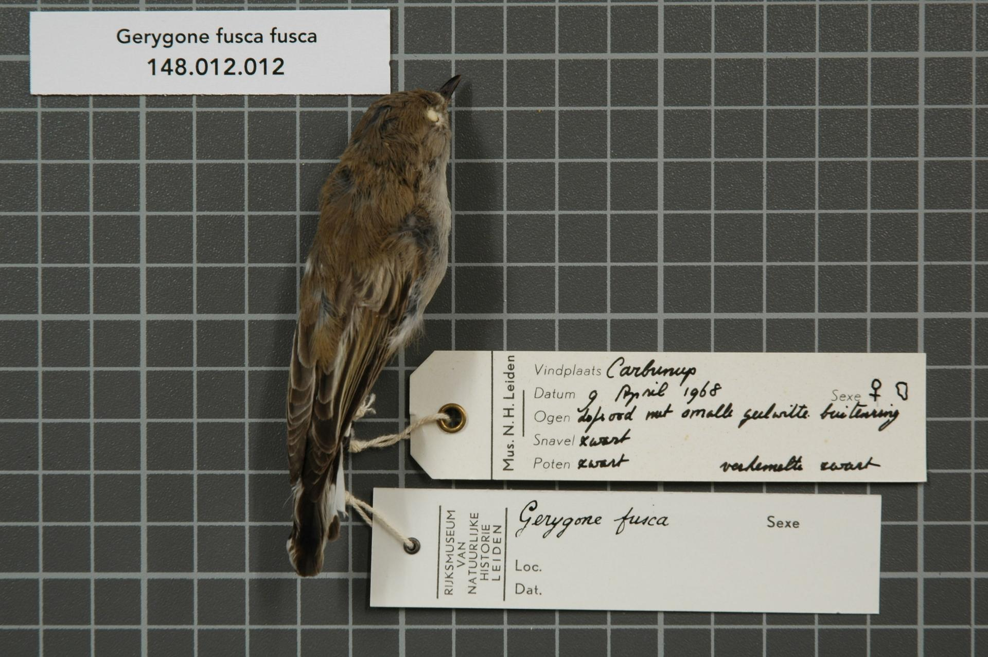 Gerygone fusca fusca (Gould, 1838)